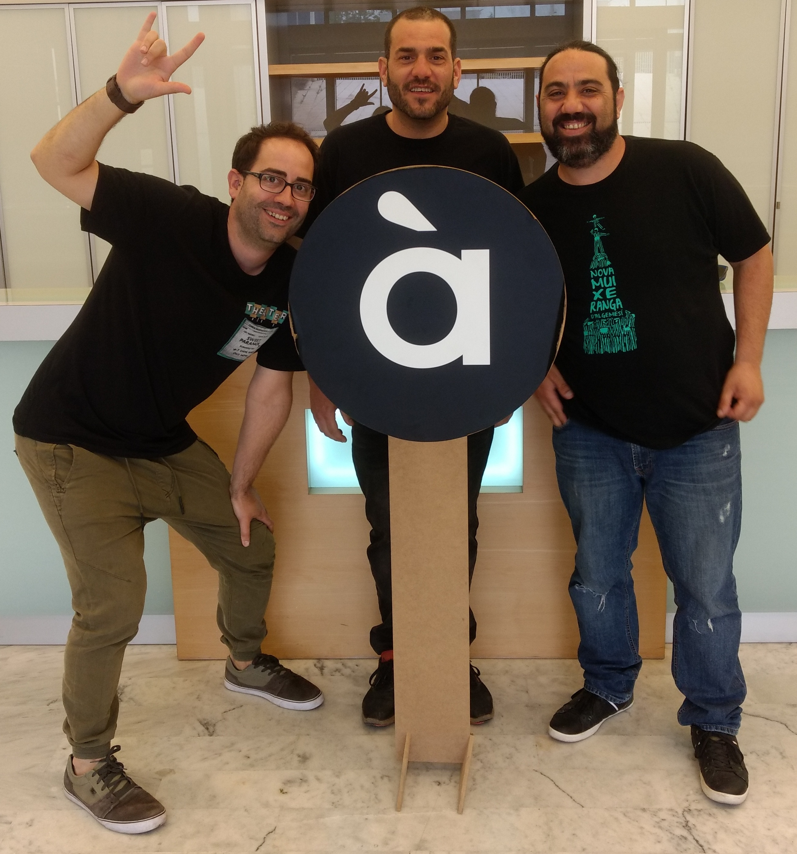 Gusmà Gil, Àlex "el dur" i Reillo, d'Sva-ters, al Centre de producció de programes de Burjassot d'À Punt Mèdia, abans de ser entrevistats a Territori Sonor.